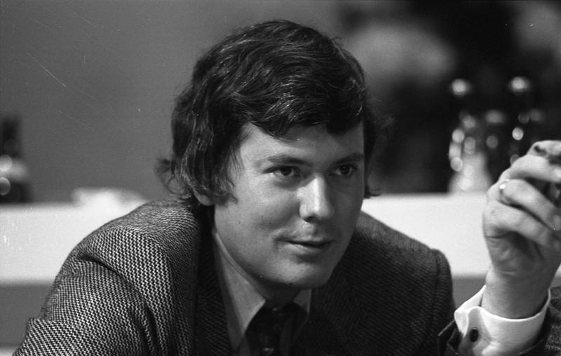 22. Bundesparteitag der CDU in Hamburg (Vors. d. Jungen Union Rheinld., MdL. Klaus Evertz) 18.-20.11.1973